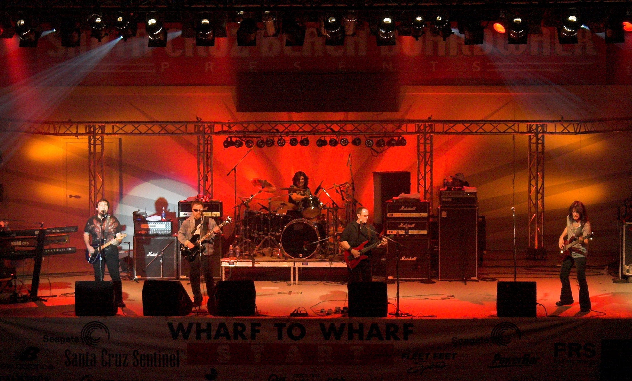 Blue Öyster Cult Live Conzert, Santa Cruz, California, USA, 25. Juli 2008